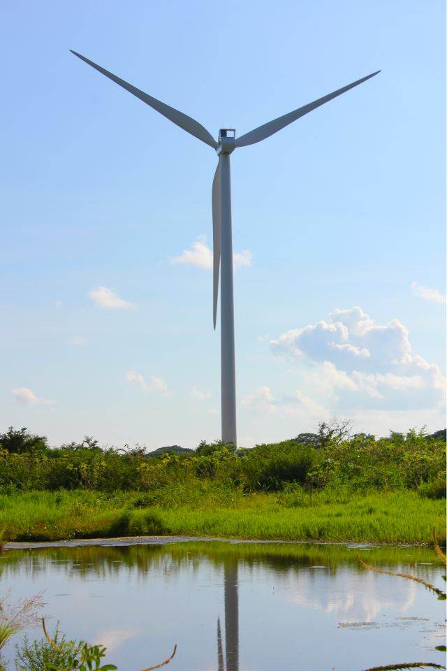 fotografia de Jorge Luis de los Santos Trujillo